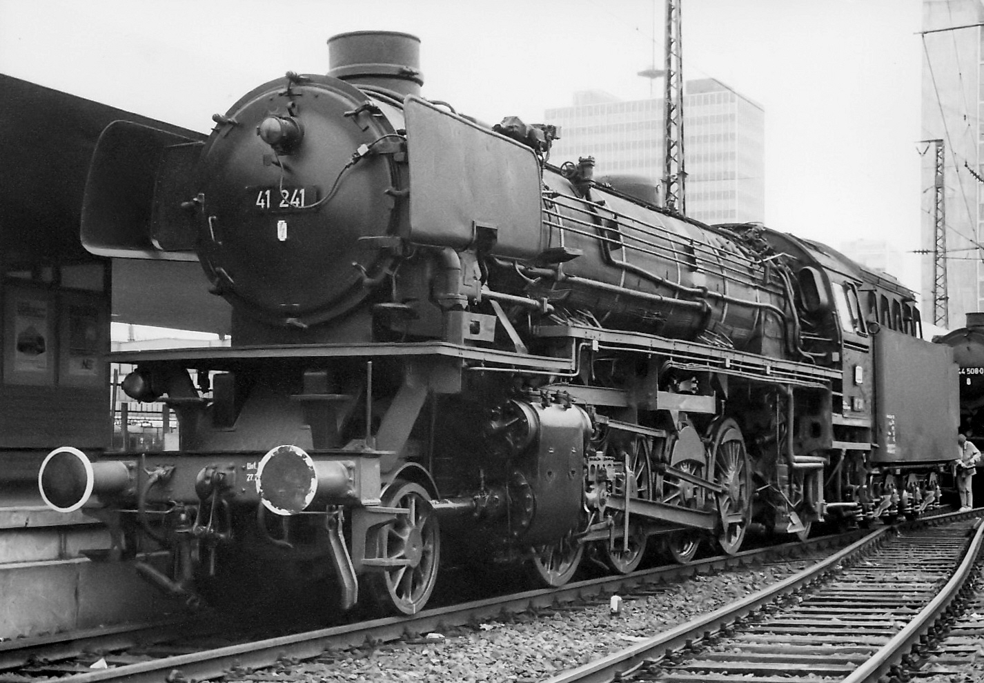 41 241 der DB AG an Gleis 22 des Essener Hauptbahnhofs Kameraposition 51° 27′ 3,60″ N, 7° 0′ 46,80″ O Dieses und weitere Bilder auf Google Maps - Google Earth - OpenStreetMap(Information)